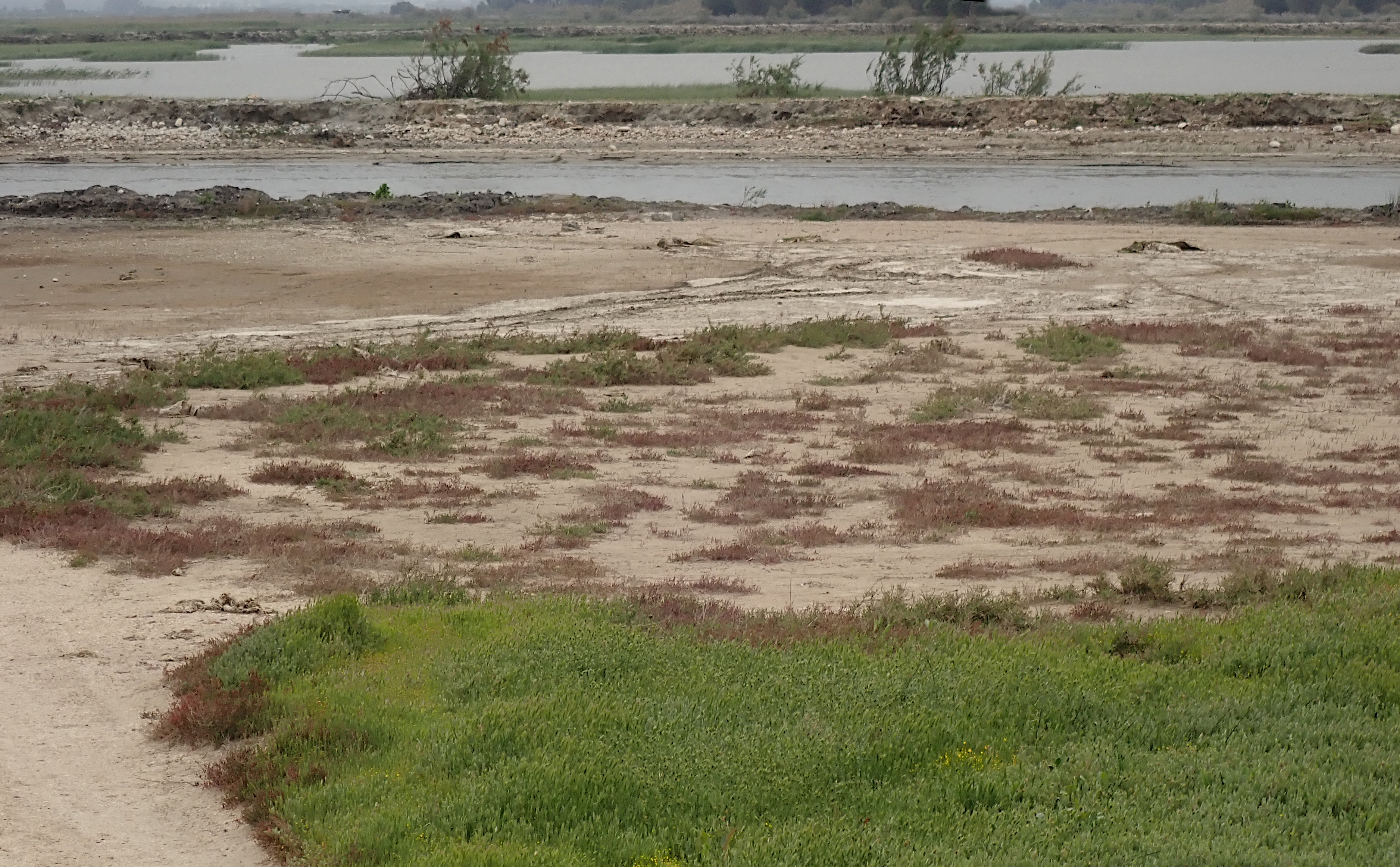 Lebensraum von Daptus vittatus in Griechenland, Peloponnes, südlich von Patras im April